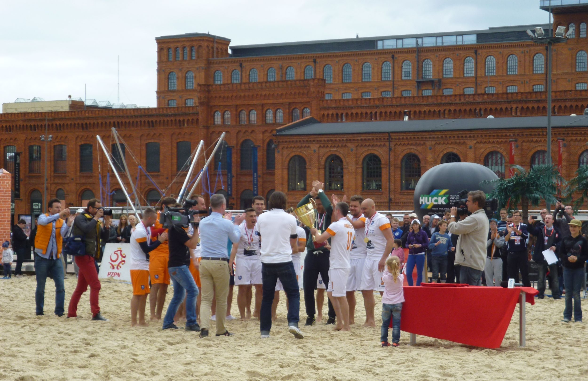 Zwycięzcy Pucharu Polski w Beach Soccerze 2014 - KP Łódź odbierający trofeum